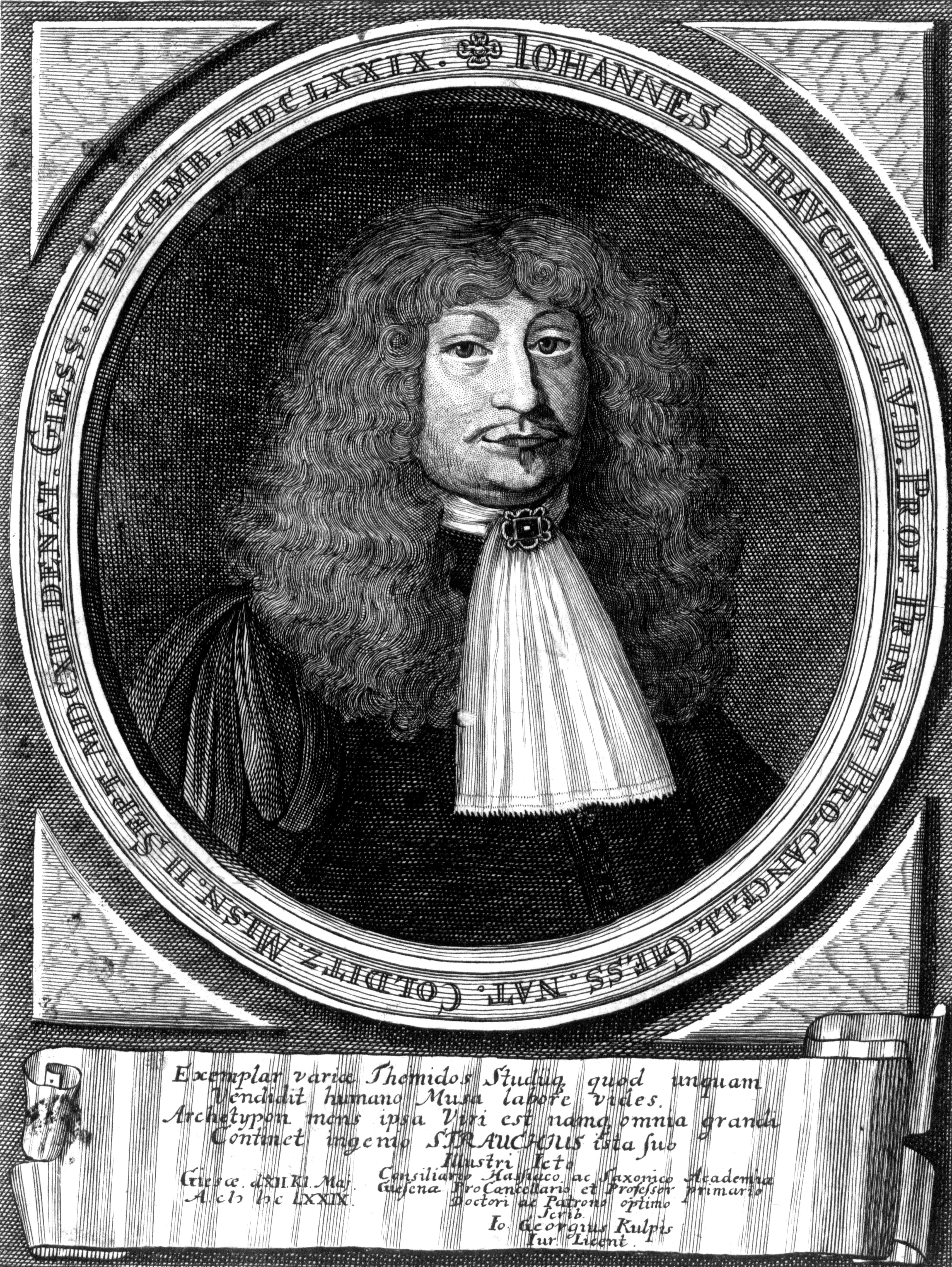 Johann Strauch II (1612-1679) deutscher Rechtswissenschaftler